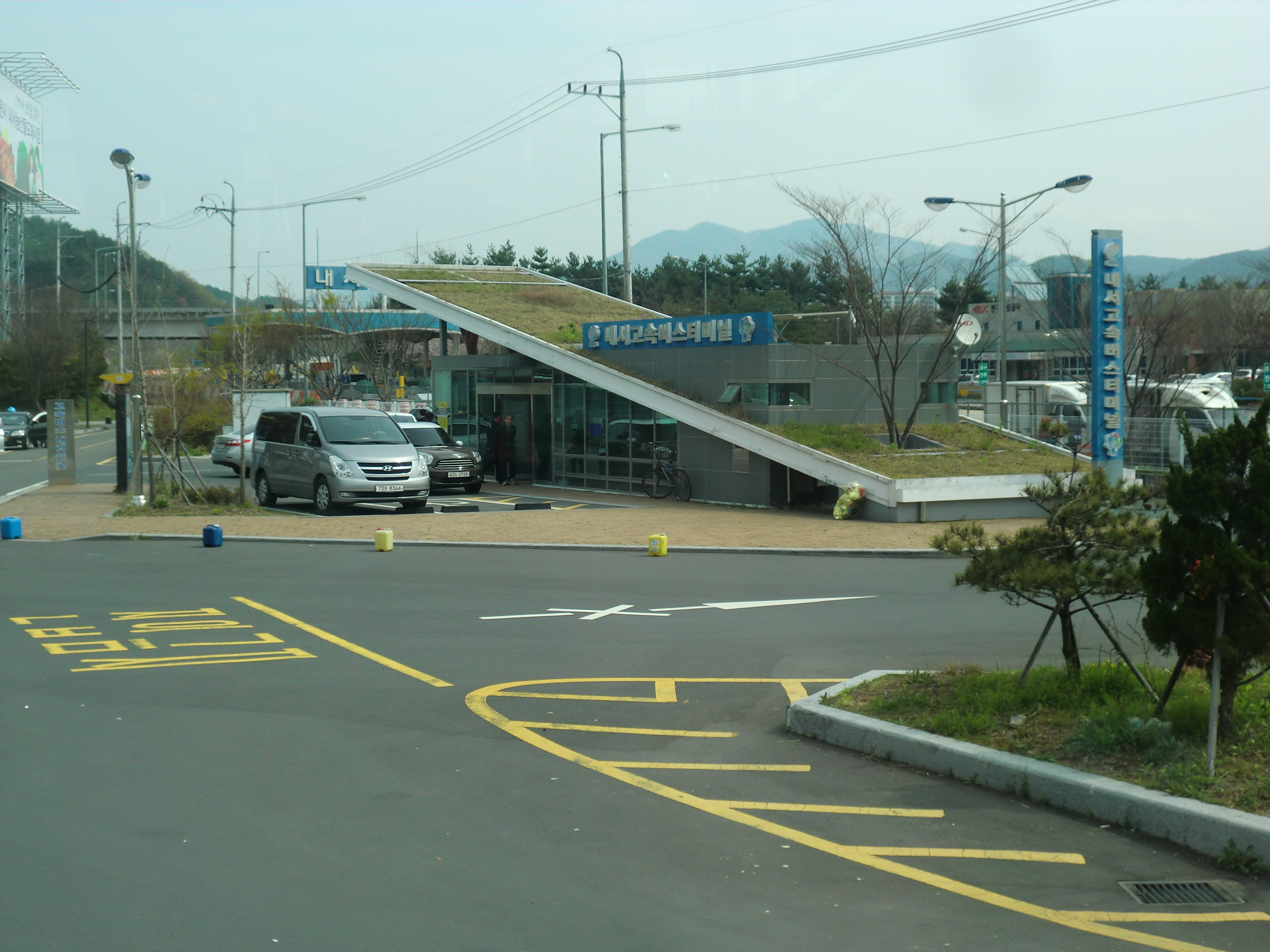 경상남도 창원시에 있는 내서고속버스터미널